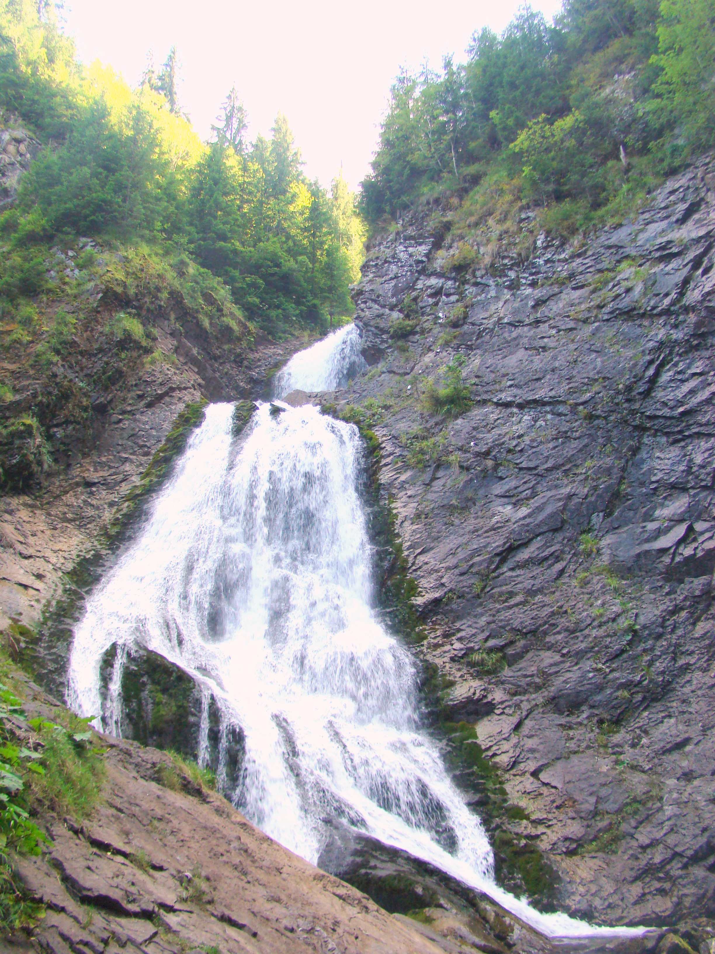 Cascada Vălul Miresii/Valea Stanciului, județul Cluj